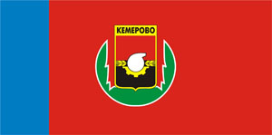 Флаг Кемерова